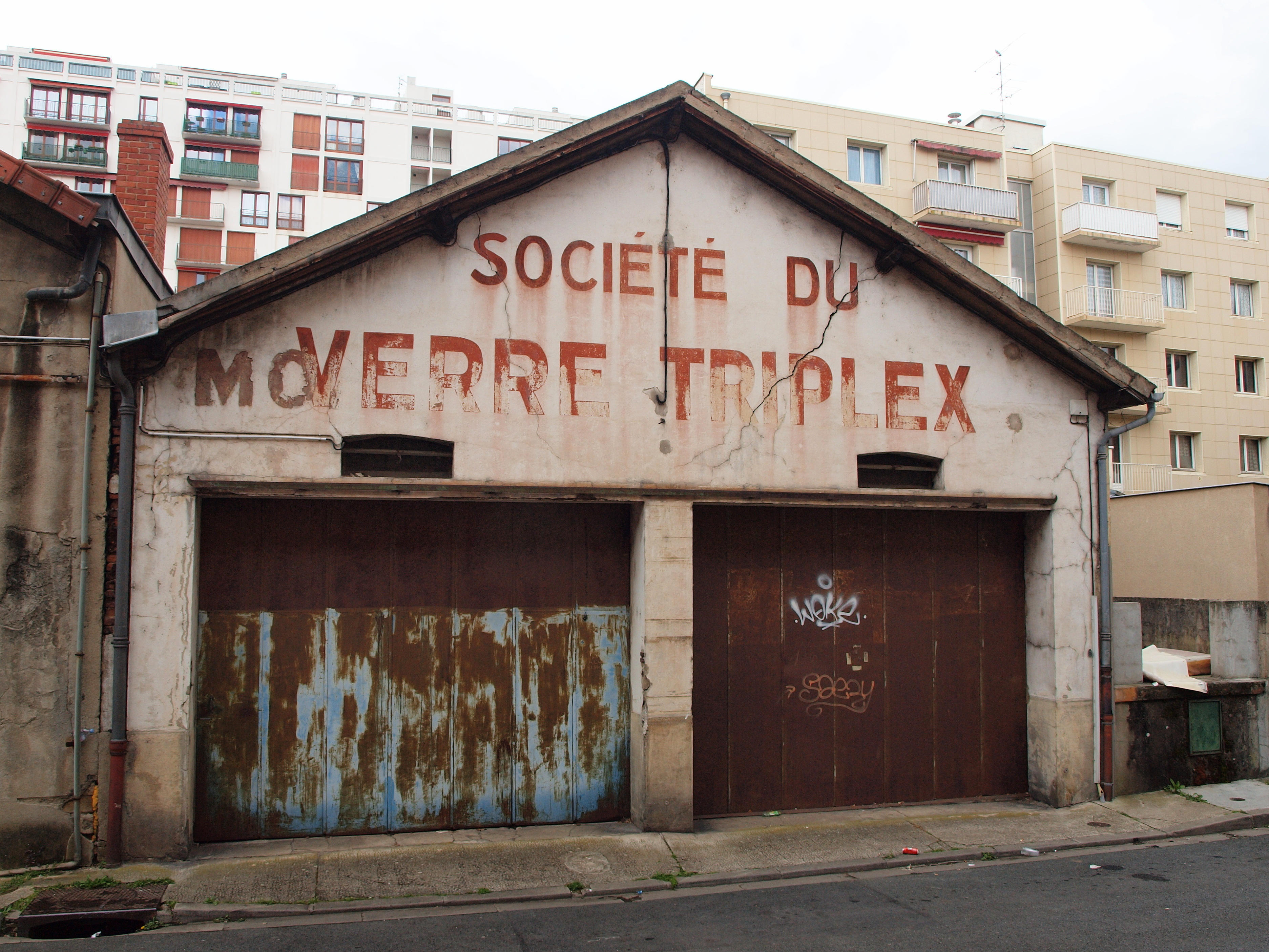 Montluçon (Allier, France) ; entrée des anciens entrepôts de la Société du Verre Triplex